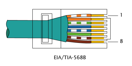 Schema connettore RJ-45 - Cablaggio EIA/TIA-568B - Orientamento dx - Elaborazione personale